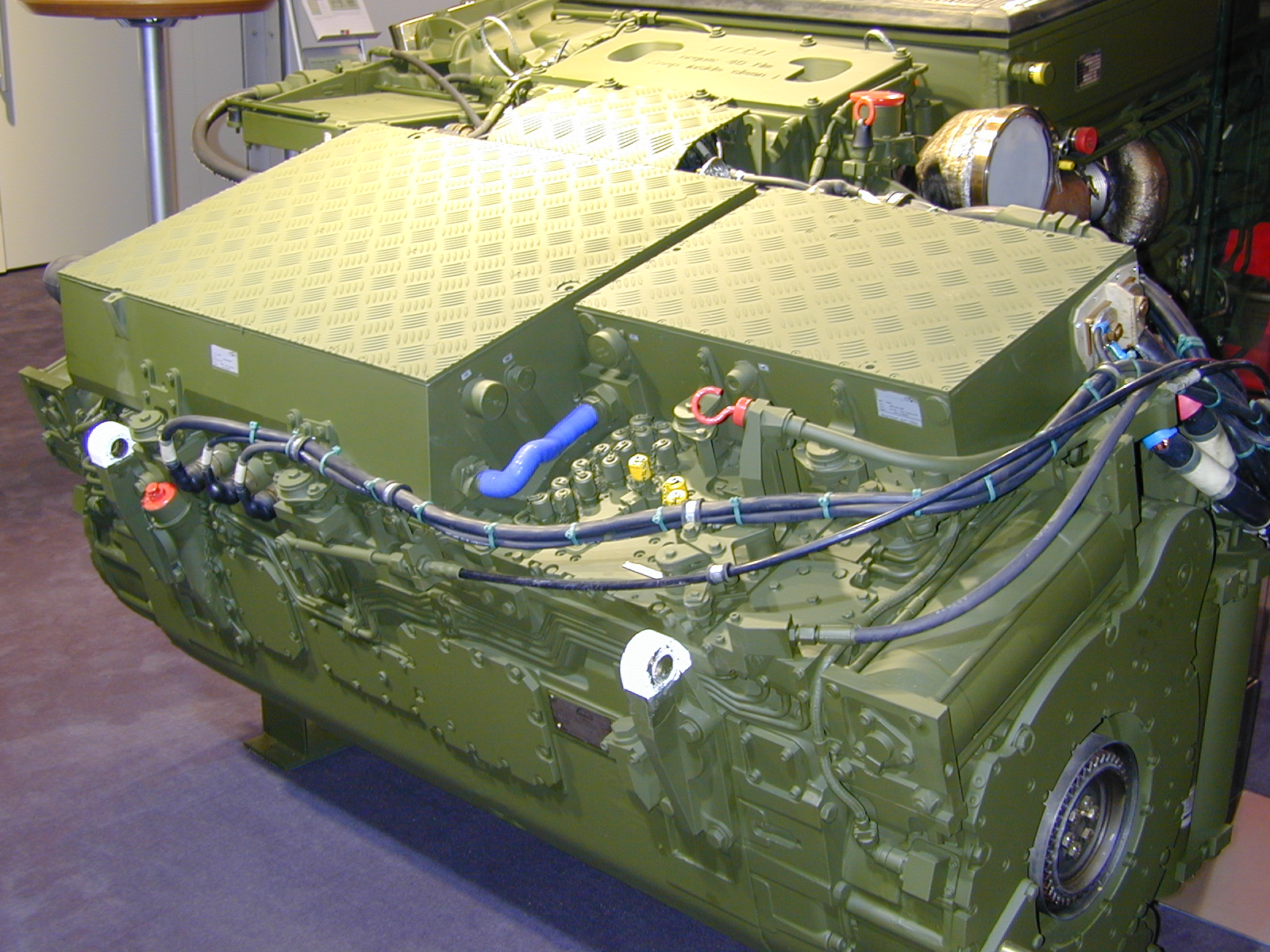 Blick auf das Puma-Triebwerk, Getriebeseite